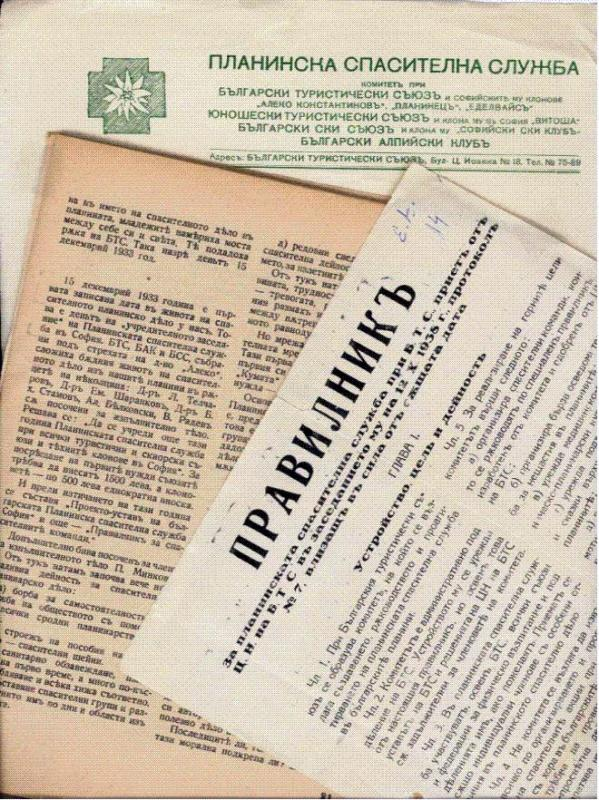 Първите документи на Планинската спасителна служба, включително Правилникът от 1938 година